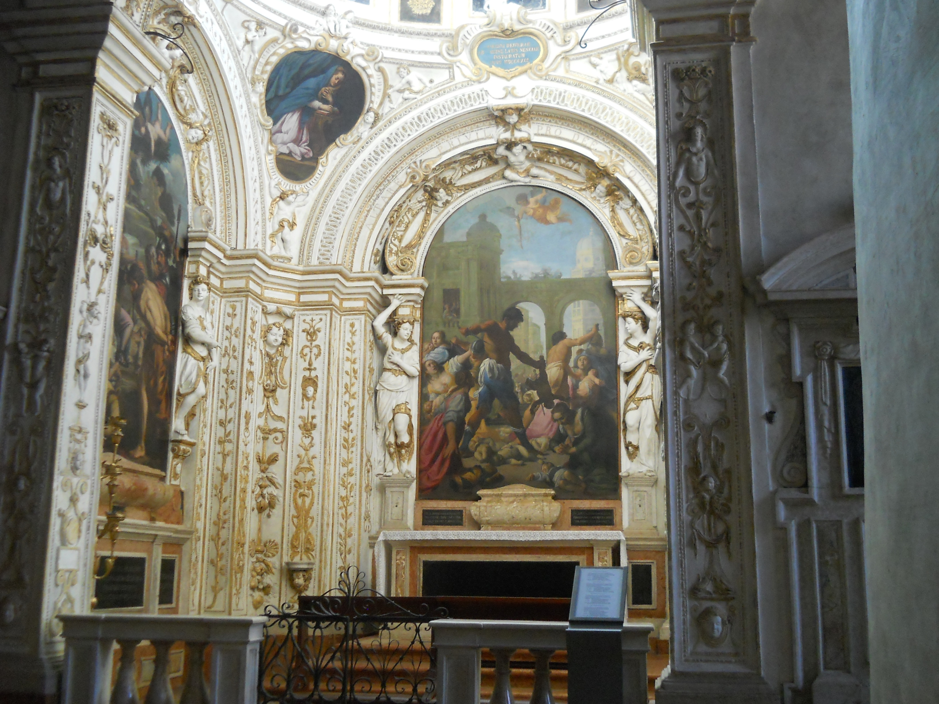 Cappella Varelli presso la chiesa di Santo Stefano a Verona